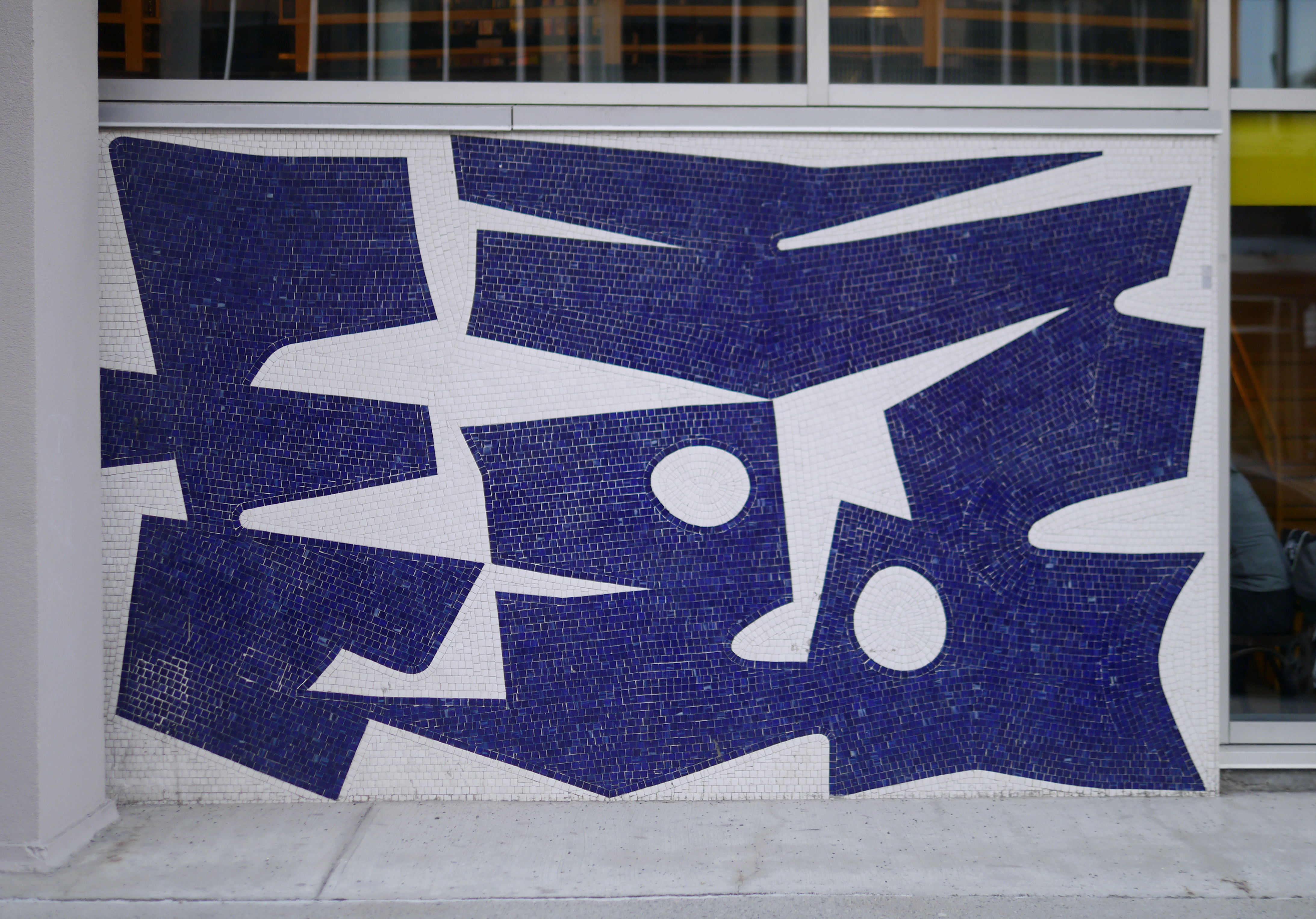 Édifice Lafayette, 585, boulevard Charest Est, Québec. Cette murale en céramique aux formes géométriques irrégulières emprunte la couleur bleue des tabliers des serveuses du restaurant Le Lafayette, qui occupait le rez-de-chaussée de l’édifice dans les années 1960. L’artiste a conçu dans le même esprit une murale intérieure.